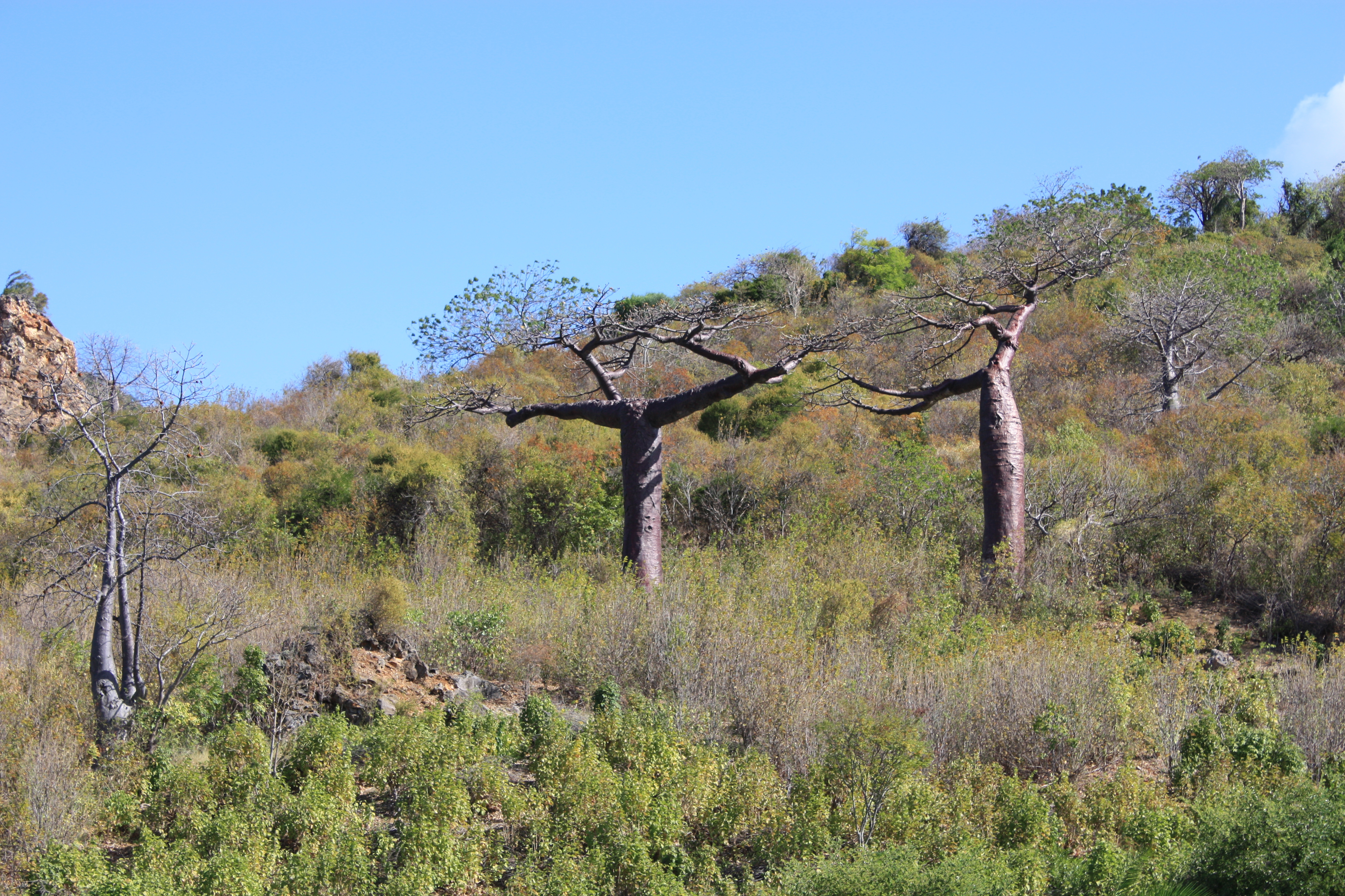 Adansonia suarezensis, near Montagne des Francais, N Madagascar